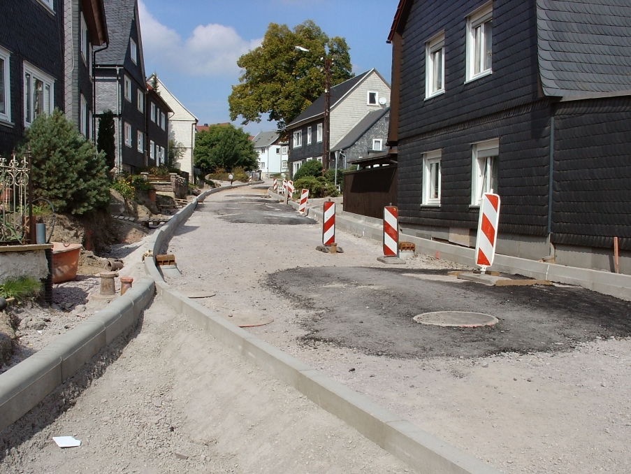 Bau der neuen Ortsdurchfahrt